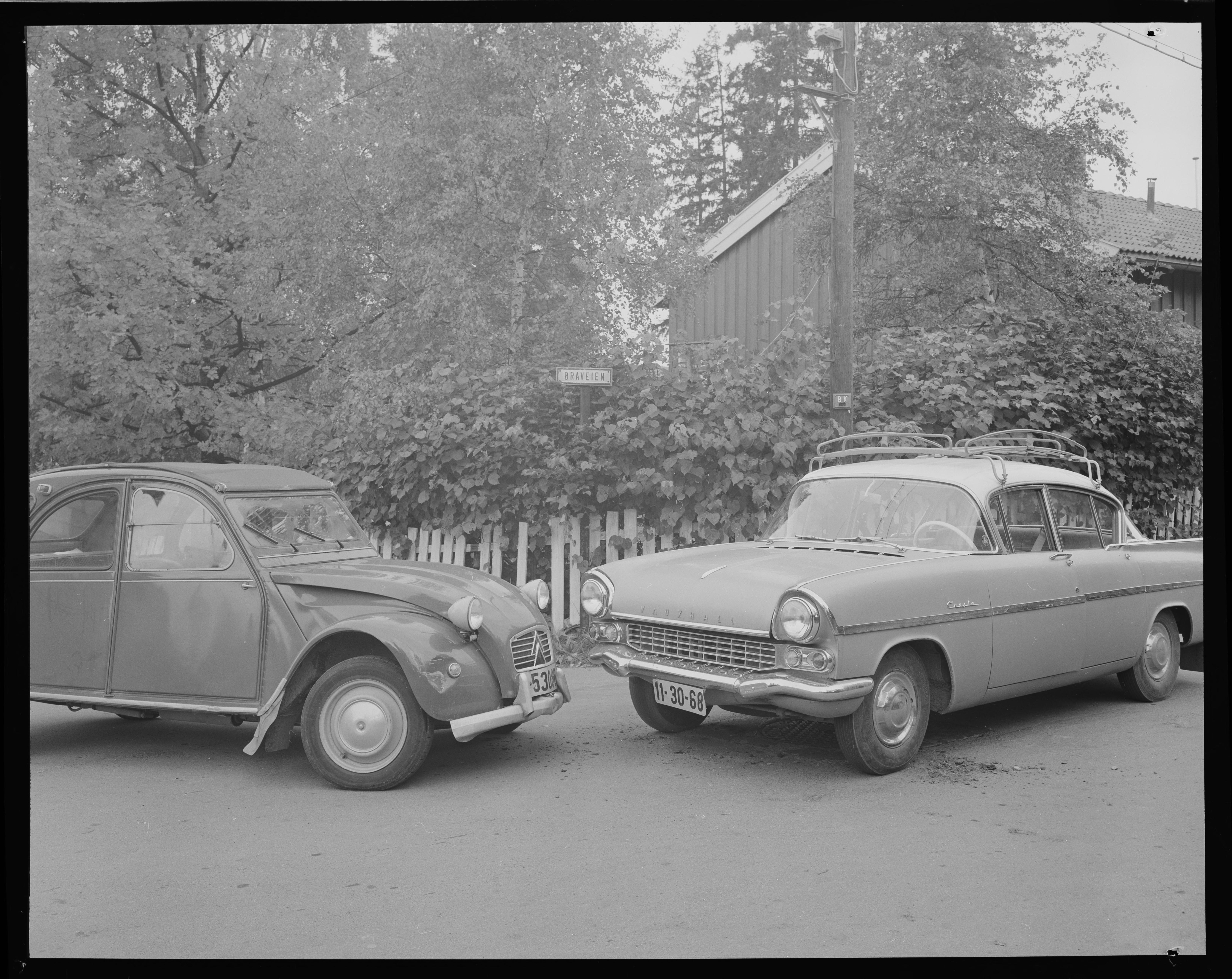 Bildet er hentet fra Nasjonalbibliotekets bildesamling. Anmerkninger til bildet var: Fotograf : ukjent Oslo,Røa, Oslo, Oslo